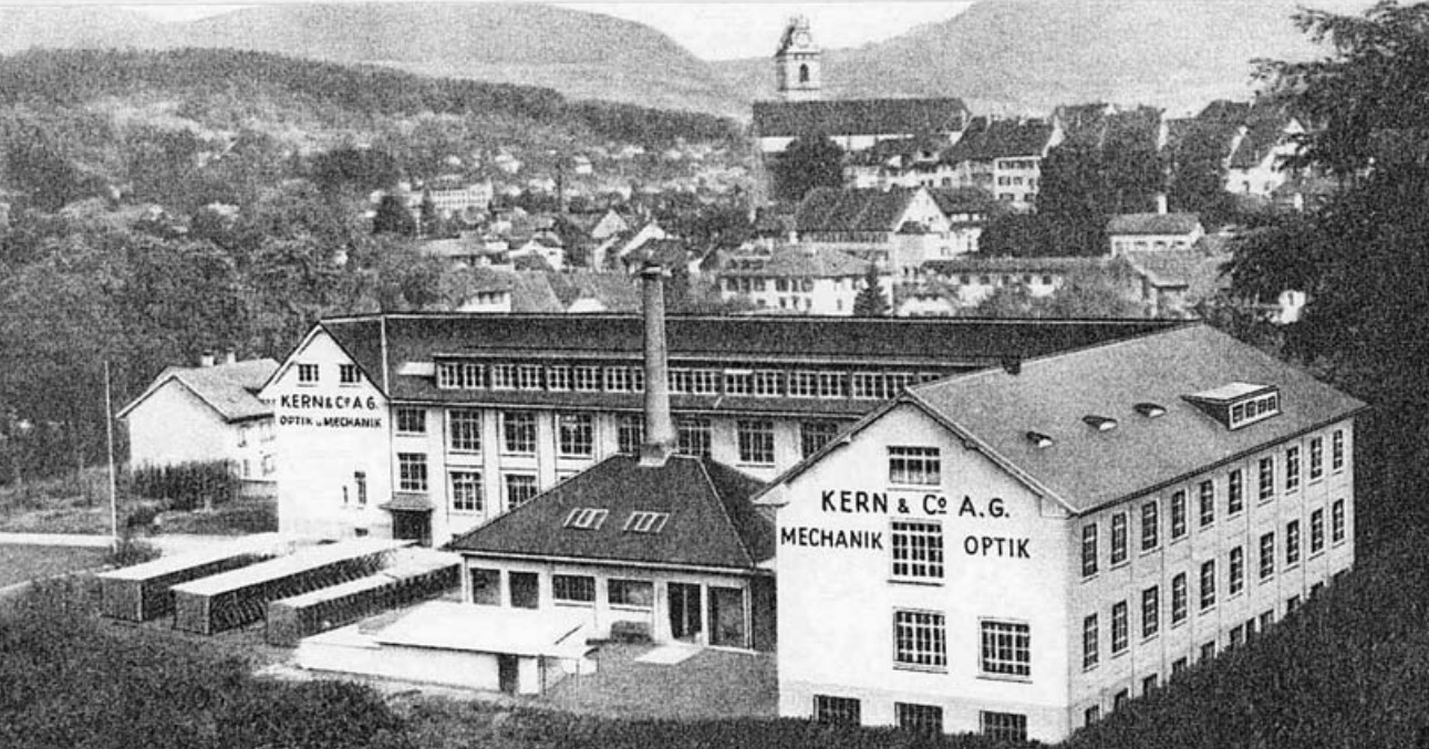 Gesamtansicht der Fabrikanlage Aarau-Schachen (1920)